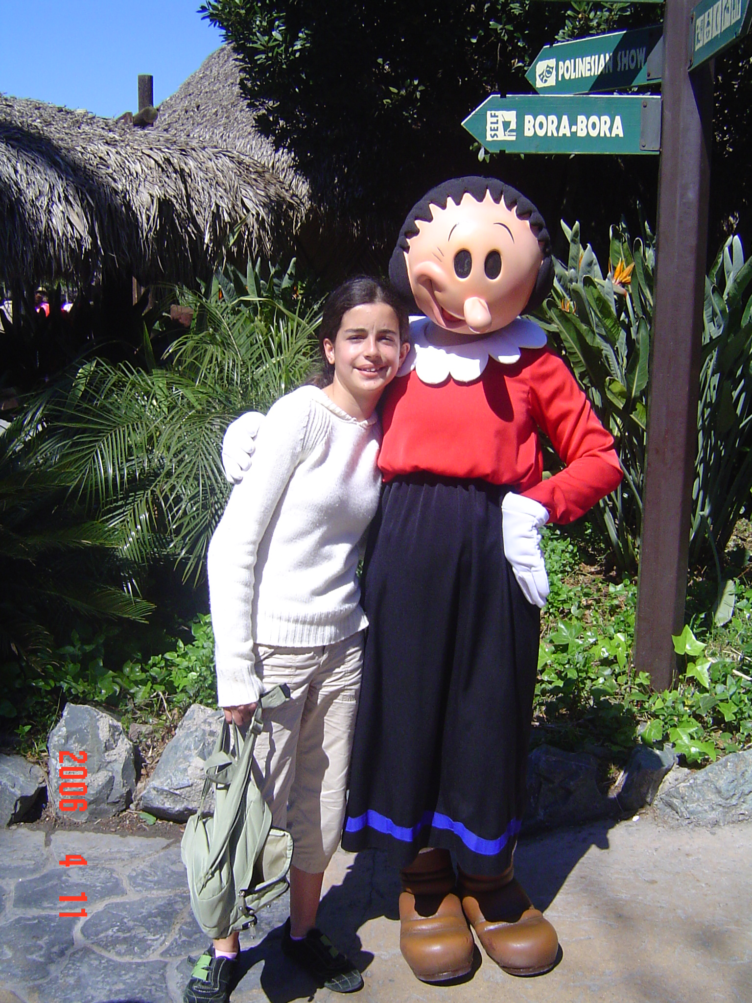 Foto com a personagem Olivia Palito, no Port Aventura.